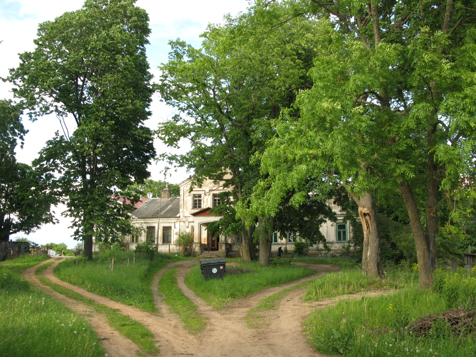 Bruņu muiža 2009. gada jūnijā